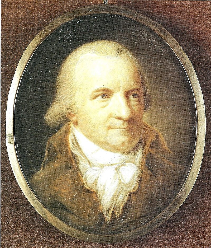 German jurist; miniature